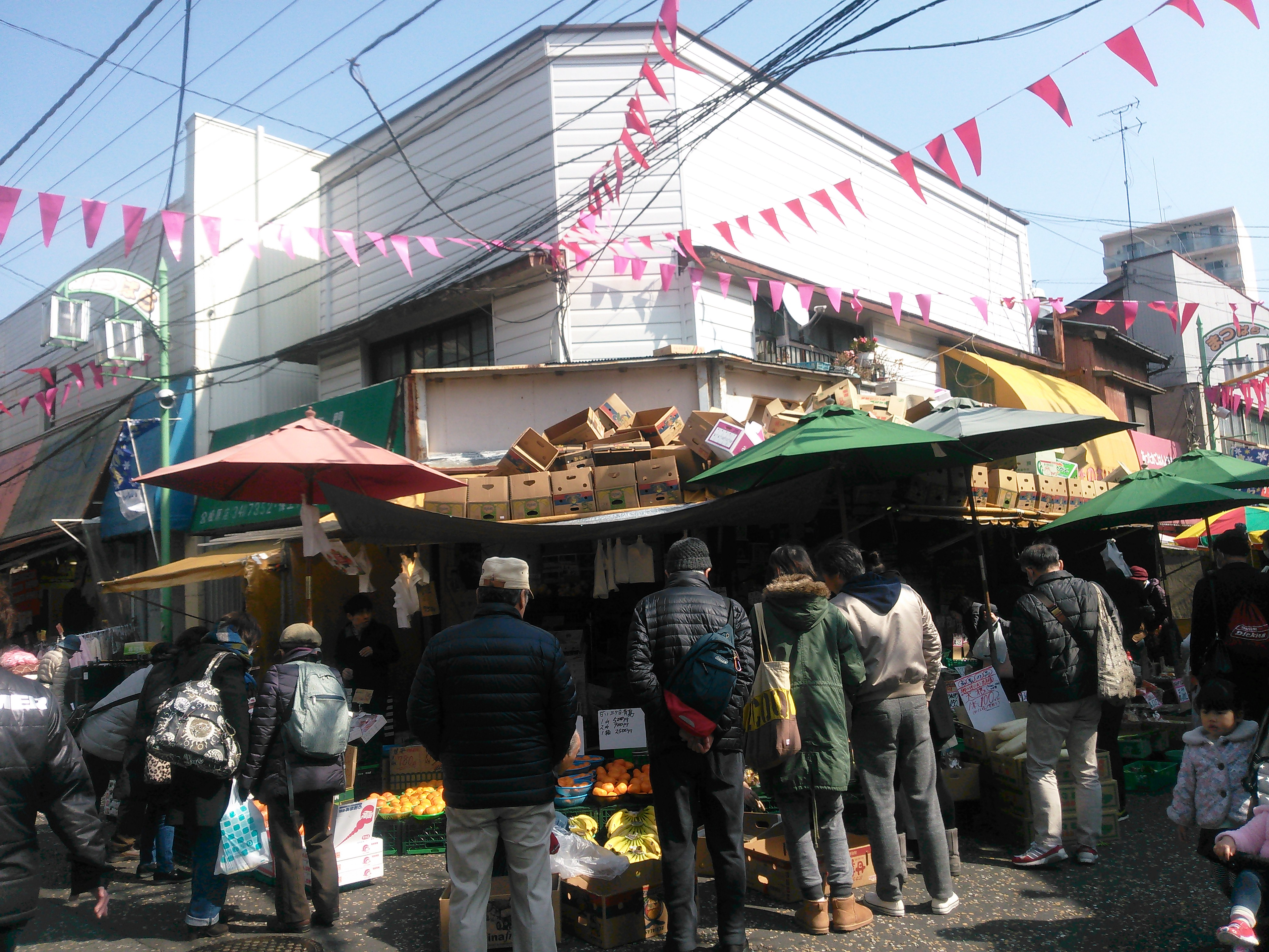 横浜市保土ケ谷区、洪福寺松原商店街の青果店